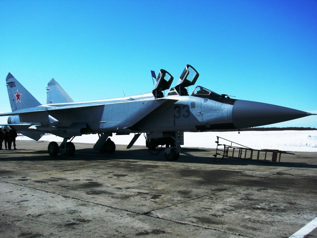 МиГ-31 Елизово